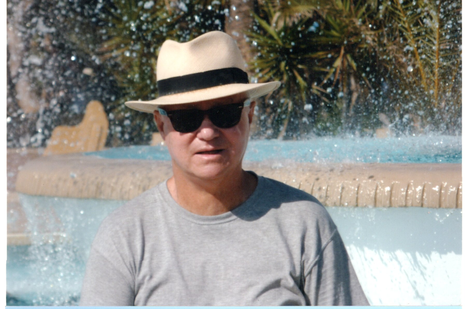 En Santa Eulalia, Ibiza, España